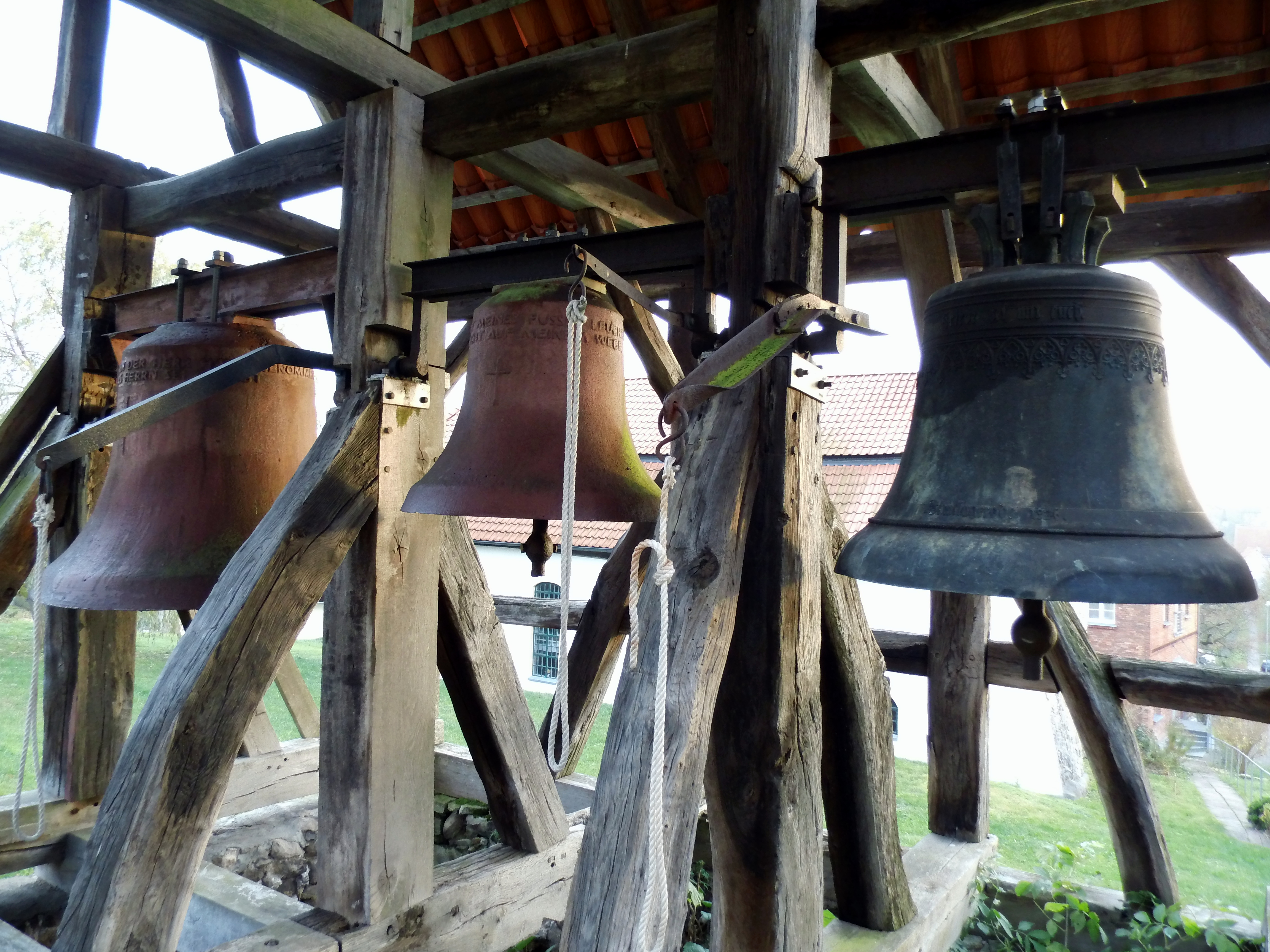 Kirchglocken im freistehenden Glockenstuhl in Limlingerode. Foto: Holger Zürch